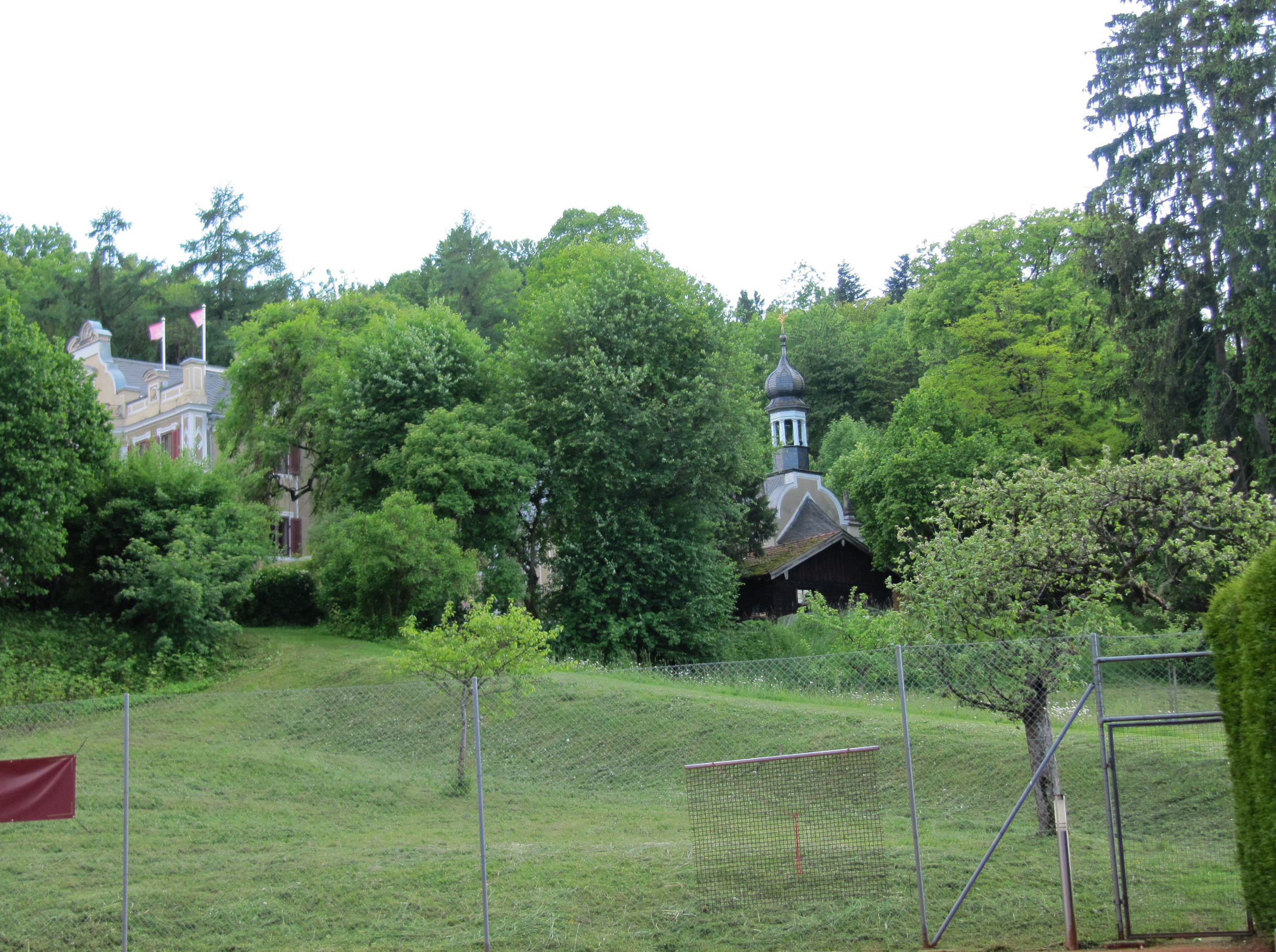 Schloss in Vagen mit Kapelle